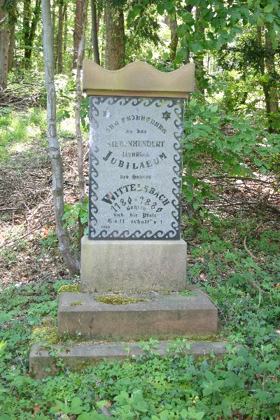 Gedenktafel zum 700 jährigen Jubiläum des Hauses Wittelsbach